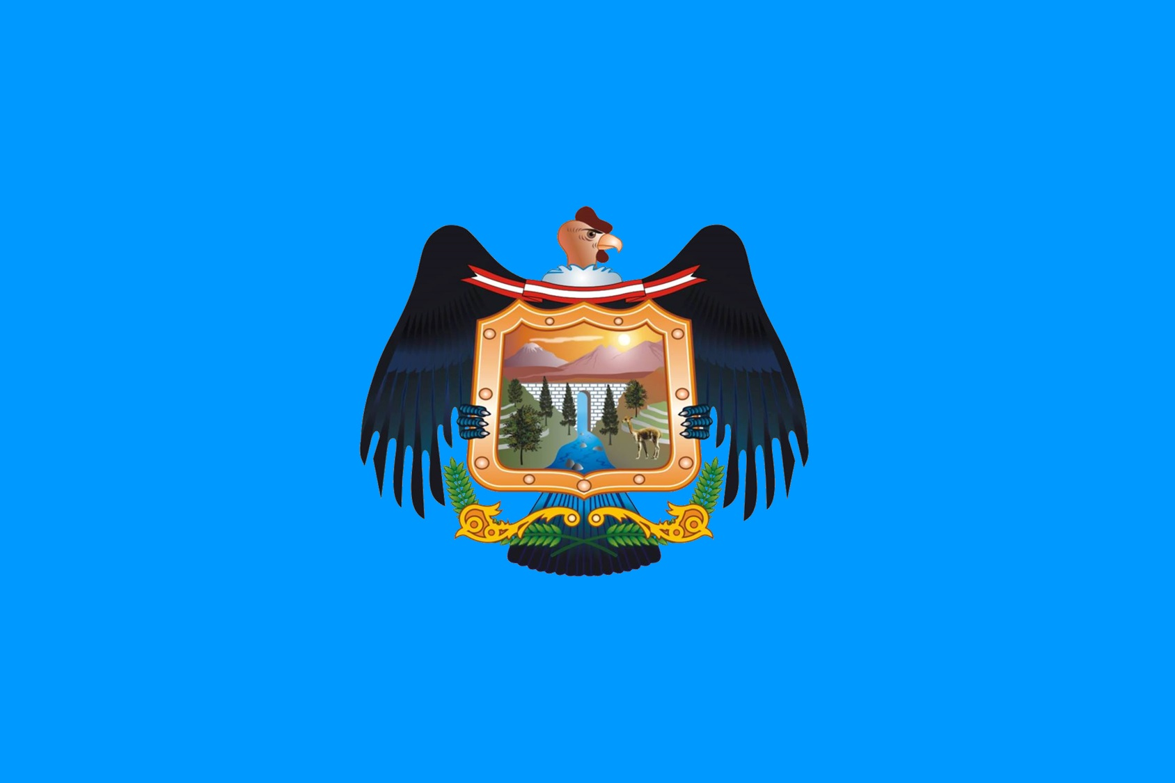 Bandera de la Provincia de Caylloma